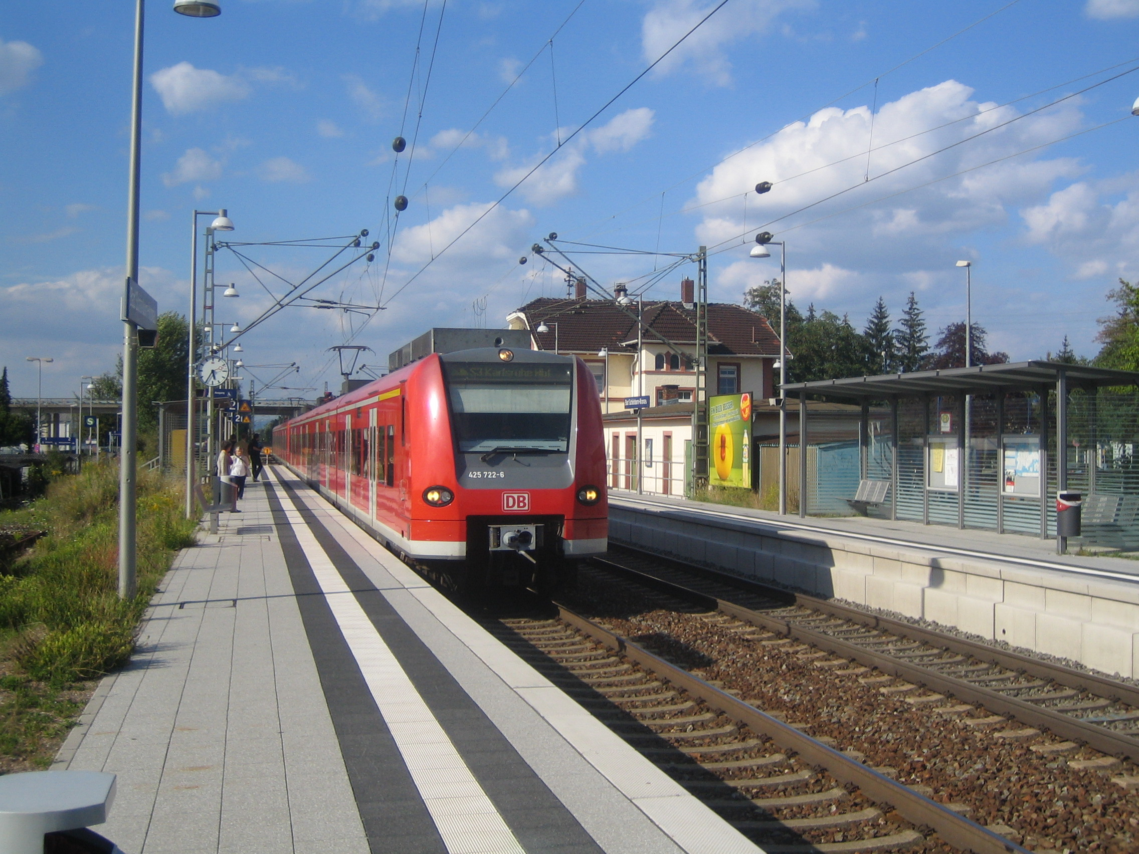 Bahnhof Bad Schönborn-Kronau mit einfahrender Rhein-Neckar-S-Bahn 425 722-6